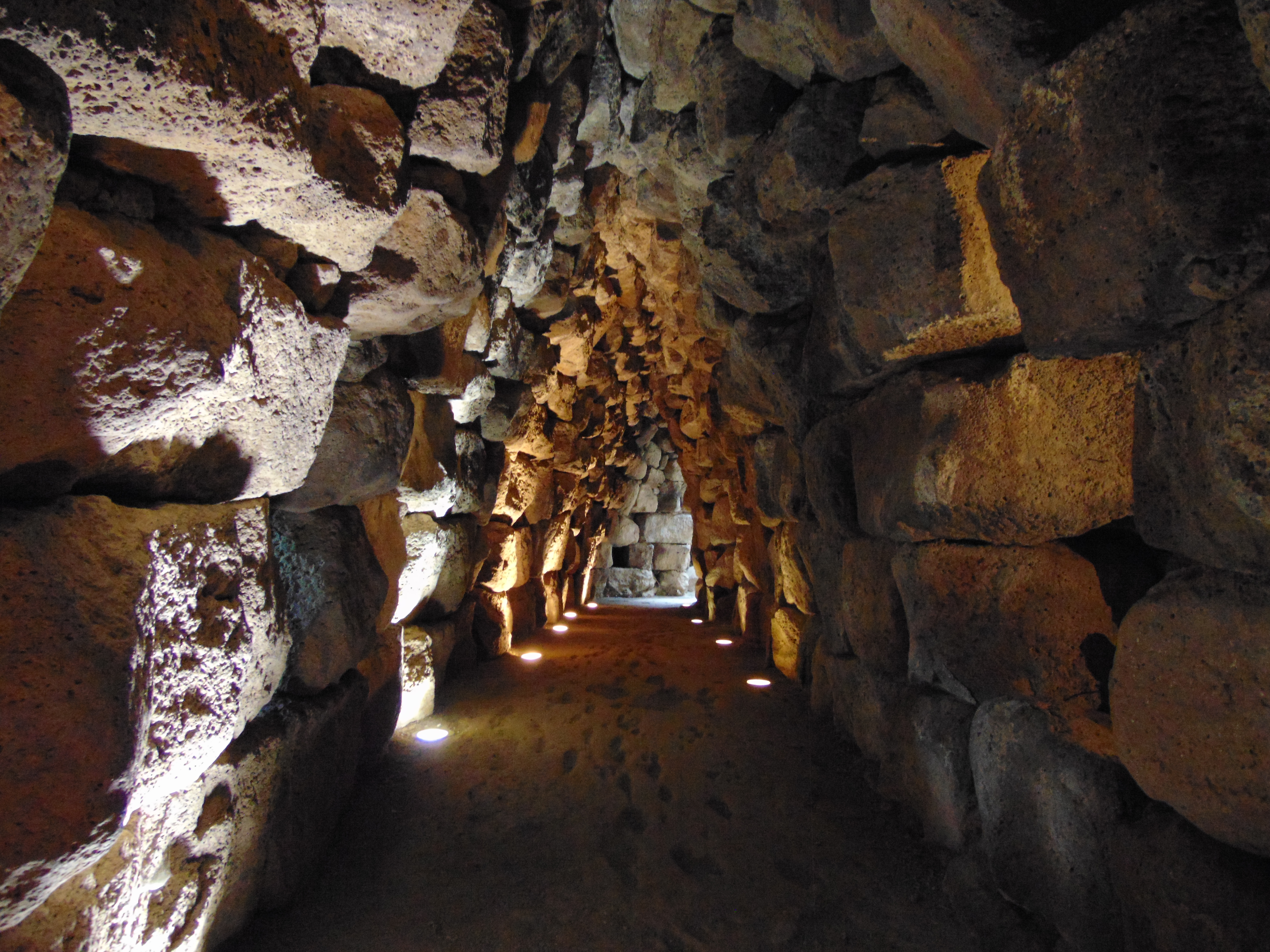 Nuraghe Santu Antine This is a photo of a monument which is part of cultural heritage of Italy.